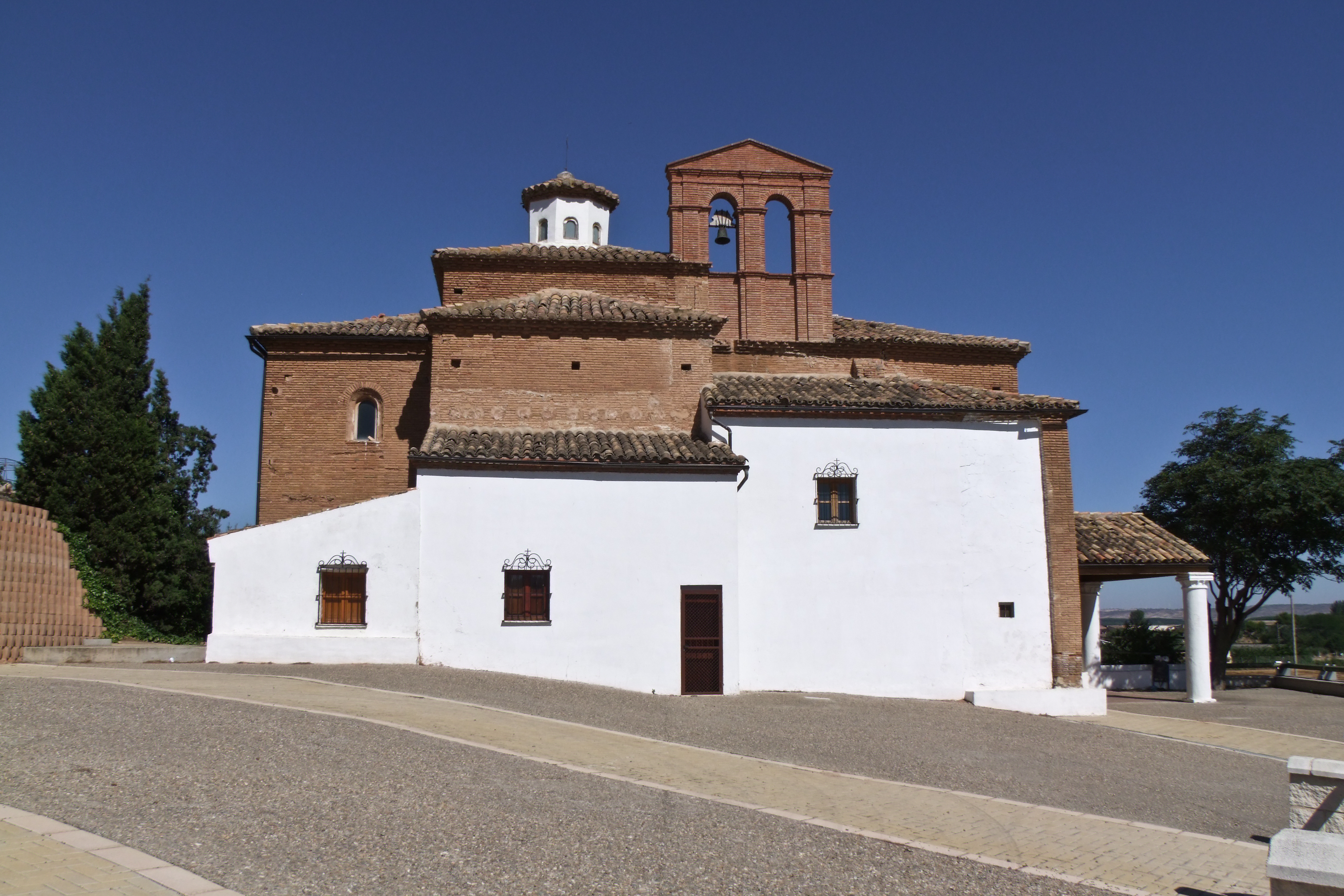 Ermita de la Virgen del Pilar en la localidad de Alfaro, La Rioja - España